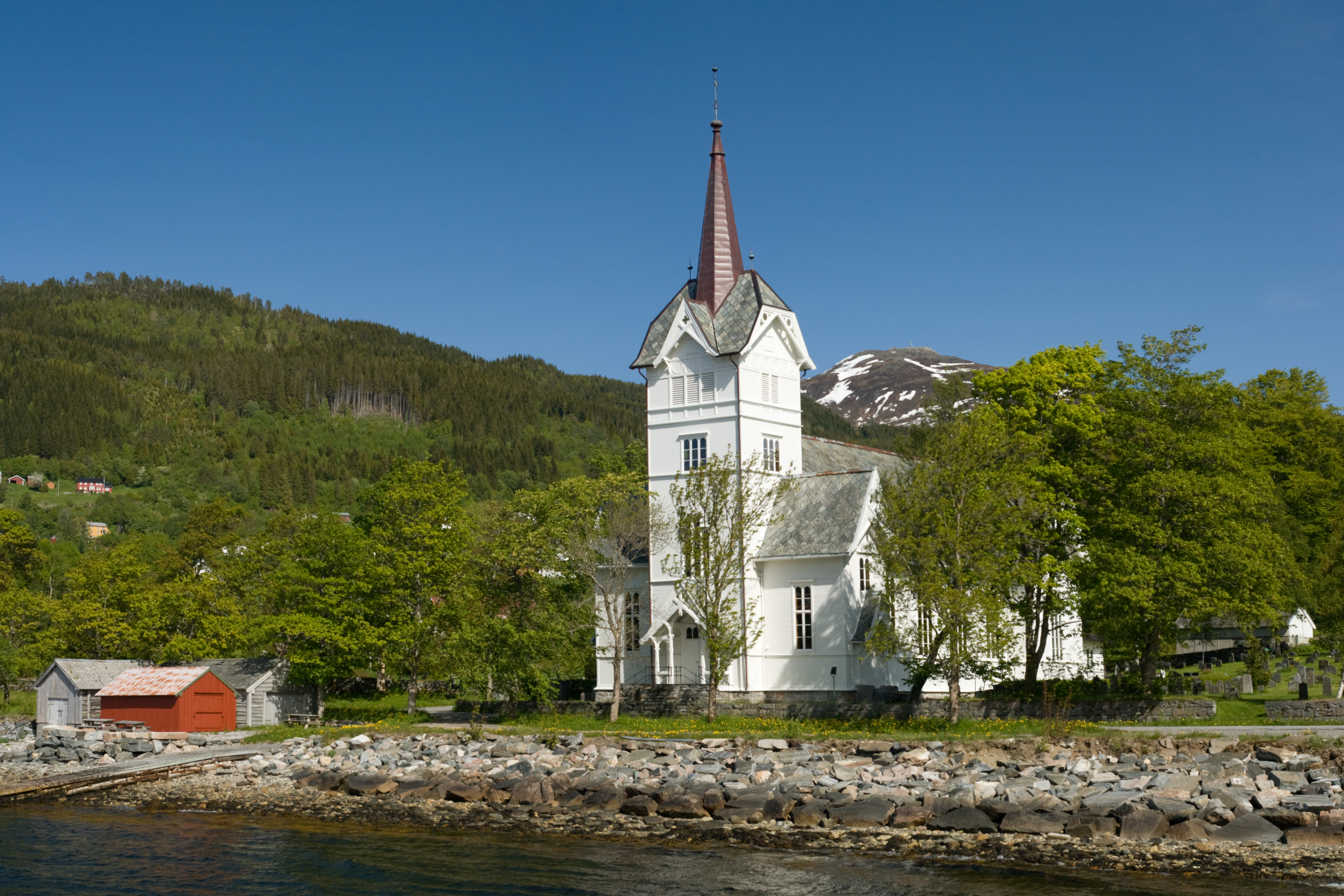 Norsk (nynorsk): Stangvik kyrkje